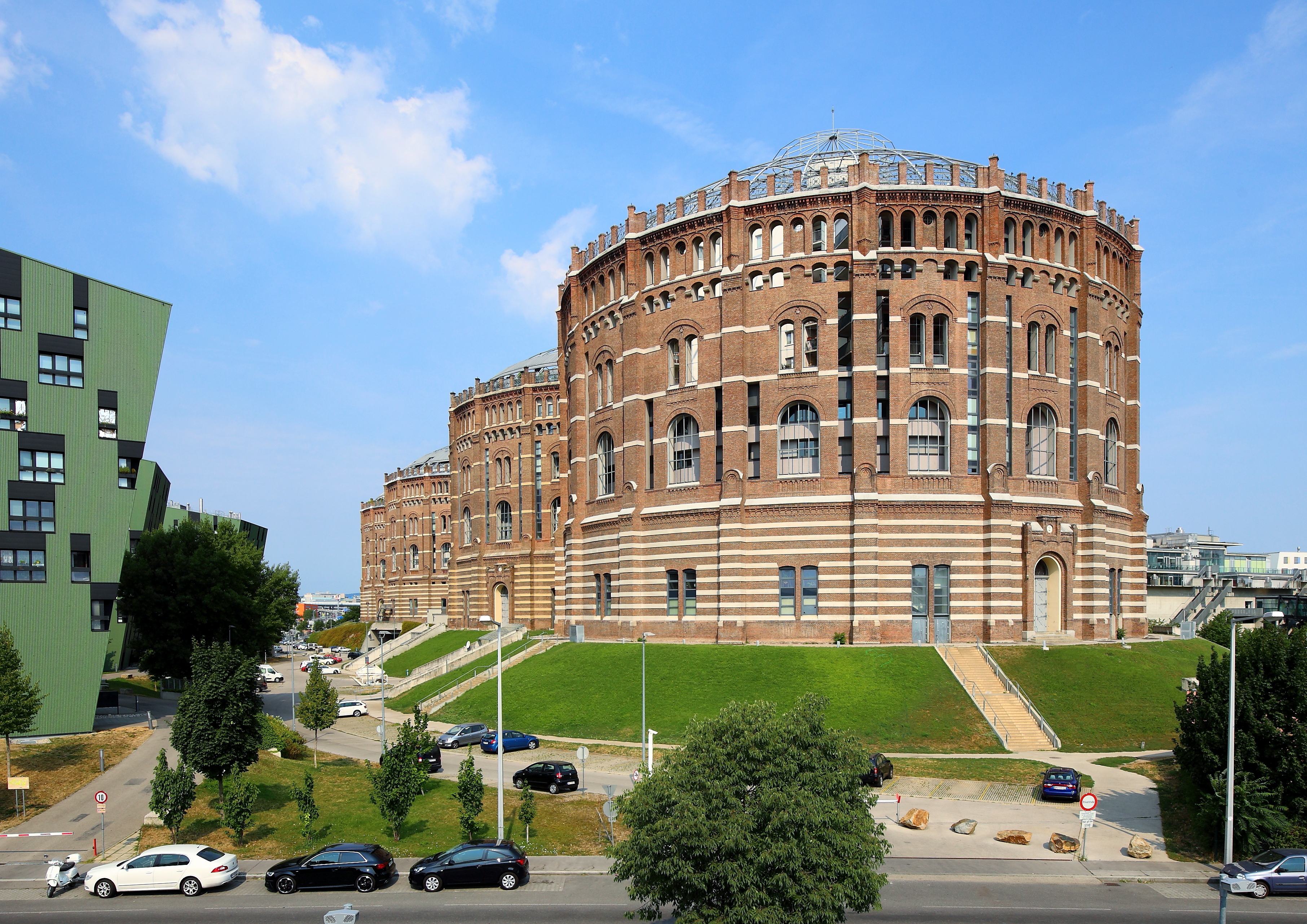 Südostansicht der 4 Gasometer im 11. Wiener Gemeindebezirk Simmering.Die 4 Gasometer mit jeweils einem Innendurchmesser von rund 63 Meter, einer Höhe von 75 Meter und einem Fassungsvolumen von 90.000 m³ Gas wurden von 1896 bis 1899 im Zuge der Errichtung des städtischen Gaswerkes Simmering gebaut. Um 1980 wurden sie als späthistoristische Industriedenkmale unter Denkmalschutz gestellt und Mitte der 1980er Jahre stillgelegt. Von 1999 bis 2001 erfolgte ein Umbau zu einem Wohn-, Geschäfts- und Einkaufszentrum, wobei nur die äußeren Sichtziegelmauerwerke mit den Dächern erhalten blieben.